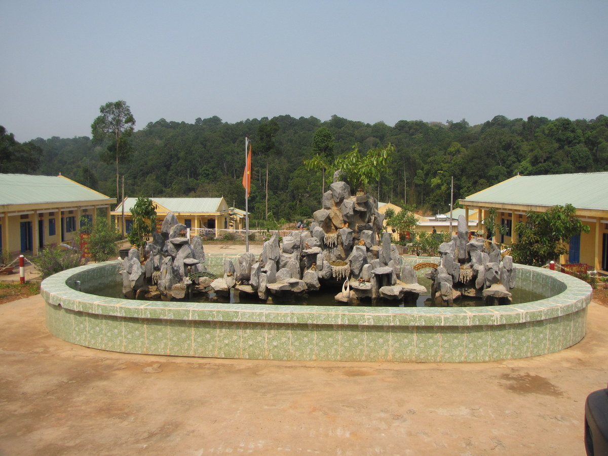 Bù Gia Mập, Binh Phuoc, Vietnam